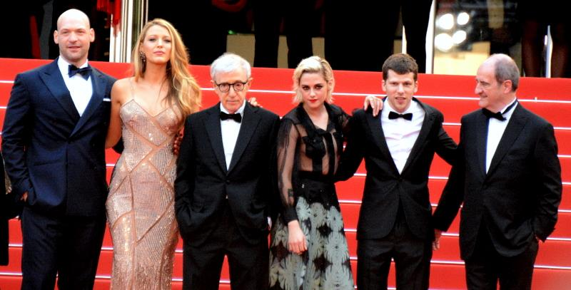 Présentation du film "Café society" au festival de Cannes. De gauche à droite : Corey Stoll, Blake Lively, Woody Allen, Kristen Stewart, Jesse Eisenberg, Pierre Lescure.